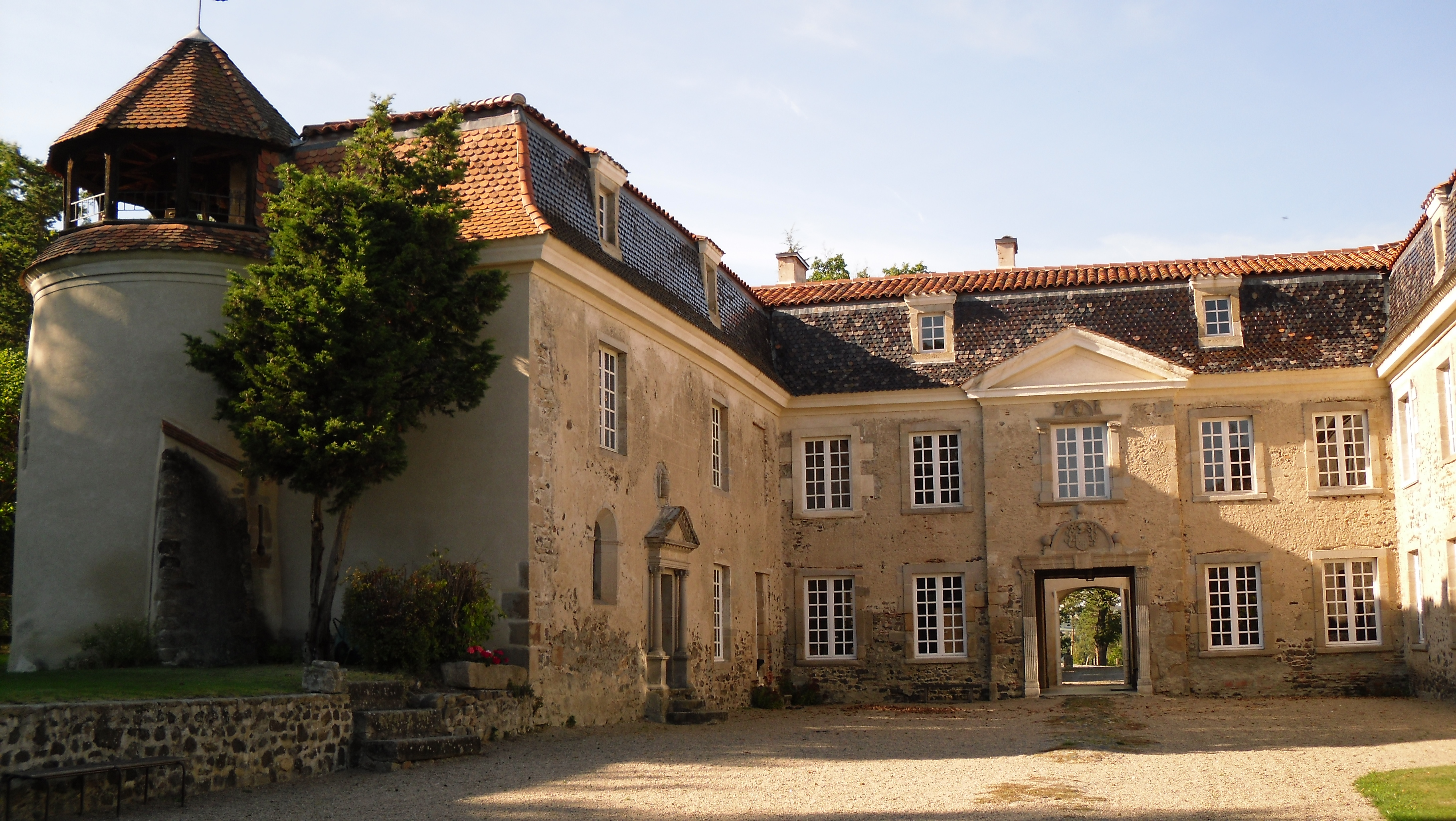 Château de Goutelas, (Inscrit, 1964) .